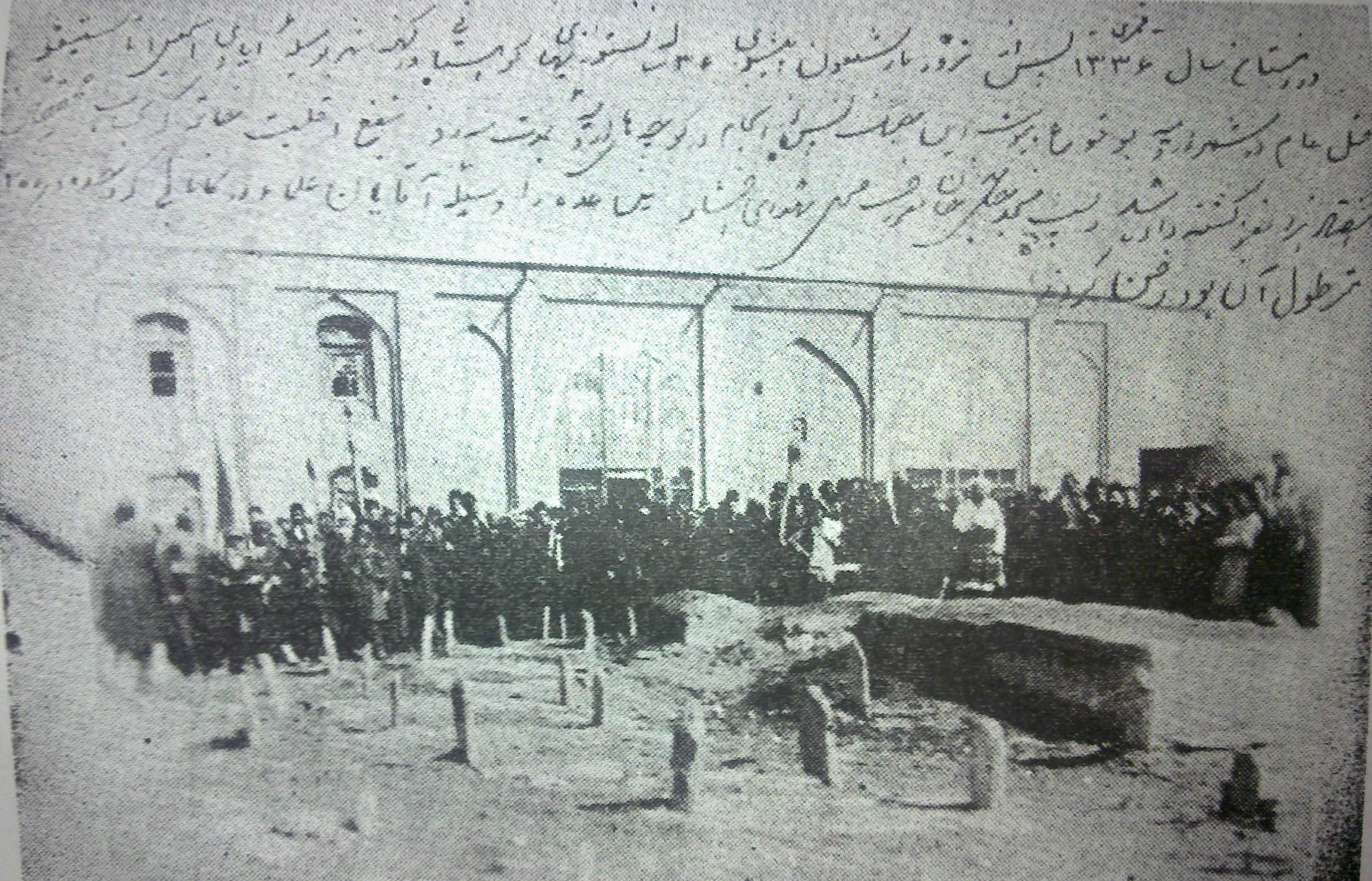 دفن شهدای آذربایجانی پس از قتل عام قبرستان مسجد حاج خان